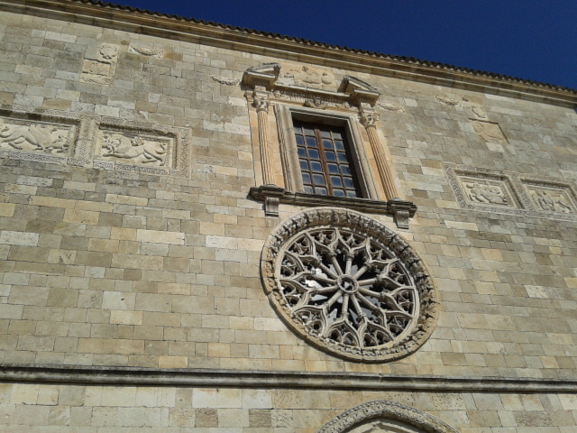 Facciata e rosone della chiesa di S. Lucia